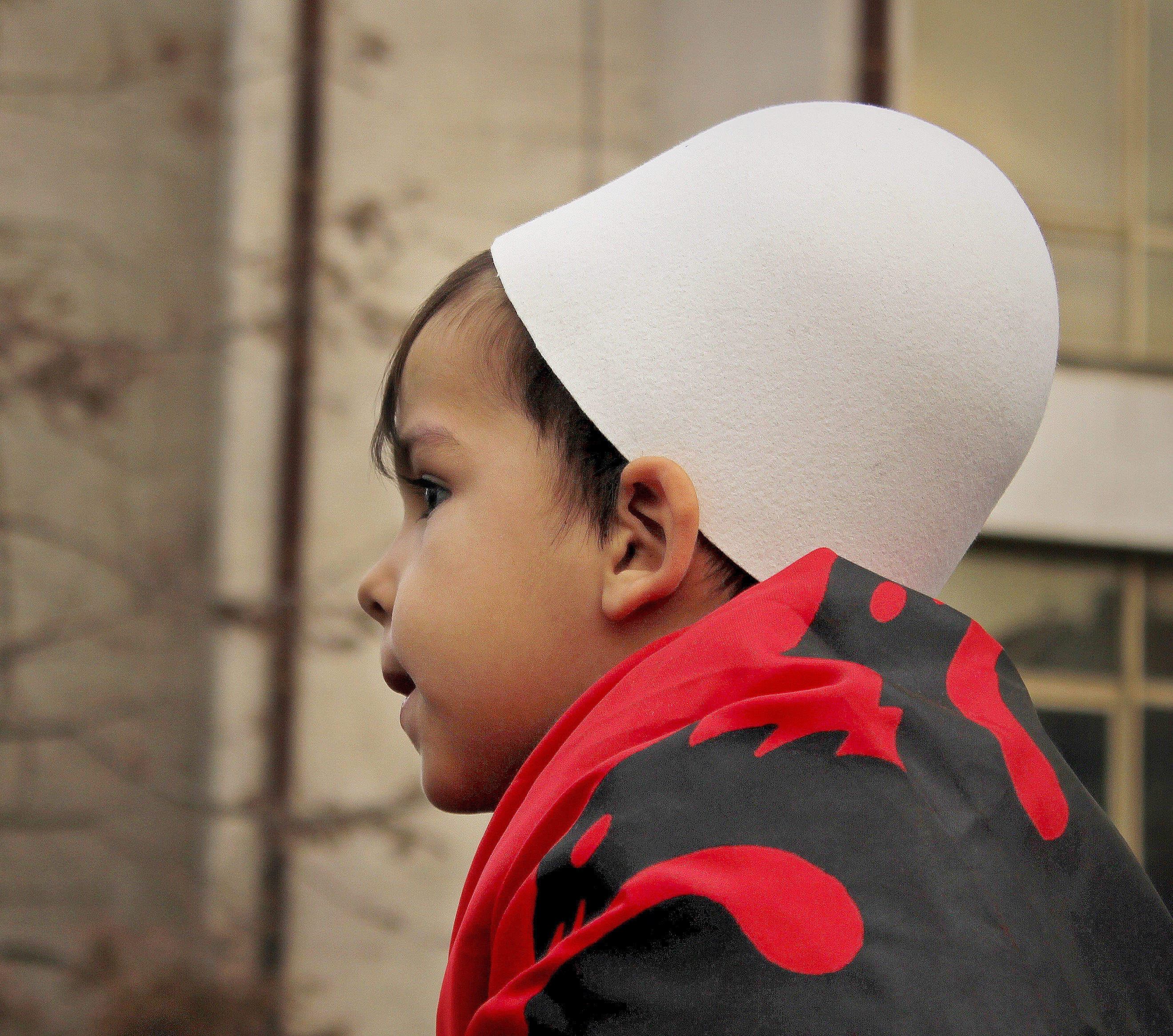 Portret nga Kosova